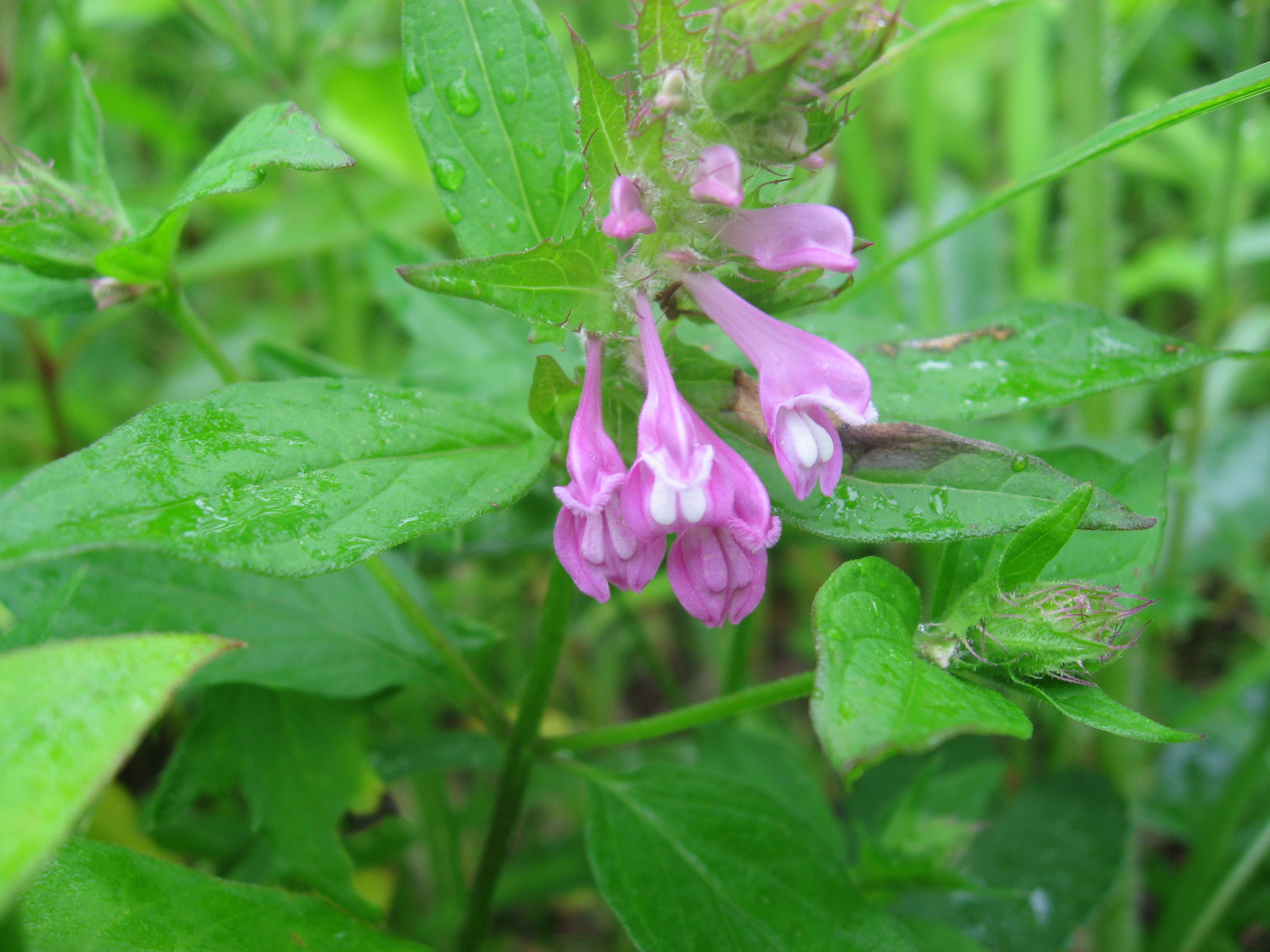 ママコナ Melampyrum roseum var. japonicum